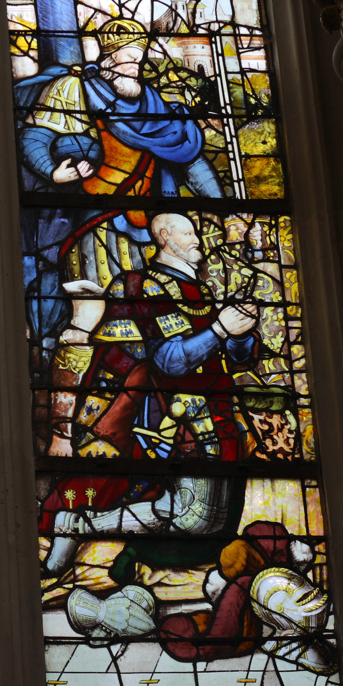 Ausschnitt des Bleiglasfensters Nr. 1 in der katholischen Pfarrkirche Saint-Acceul in Écouen (siehe Mathieu Lours: Saint-Acceul d'Écouen. Une cage de verre en pays de France, éditée par l’Association Les Amis de Saint-Acceul)